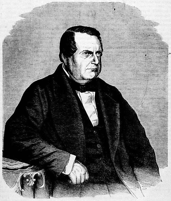 Ludwik Bierkowski 1801-1860